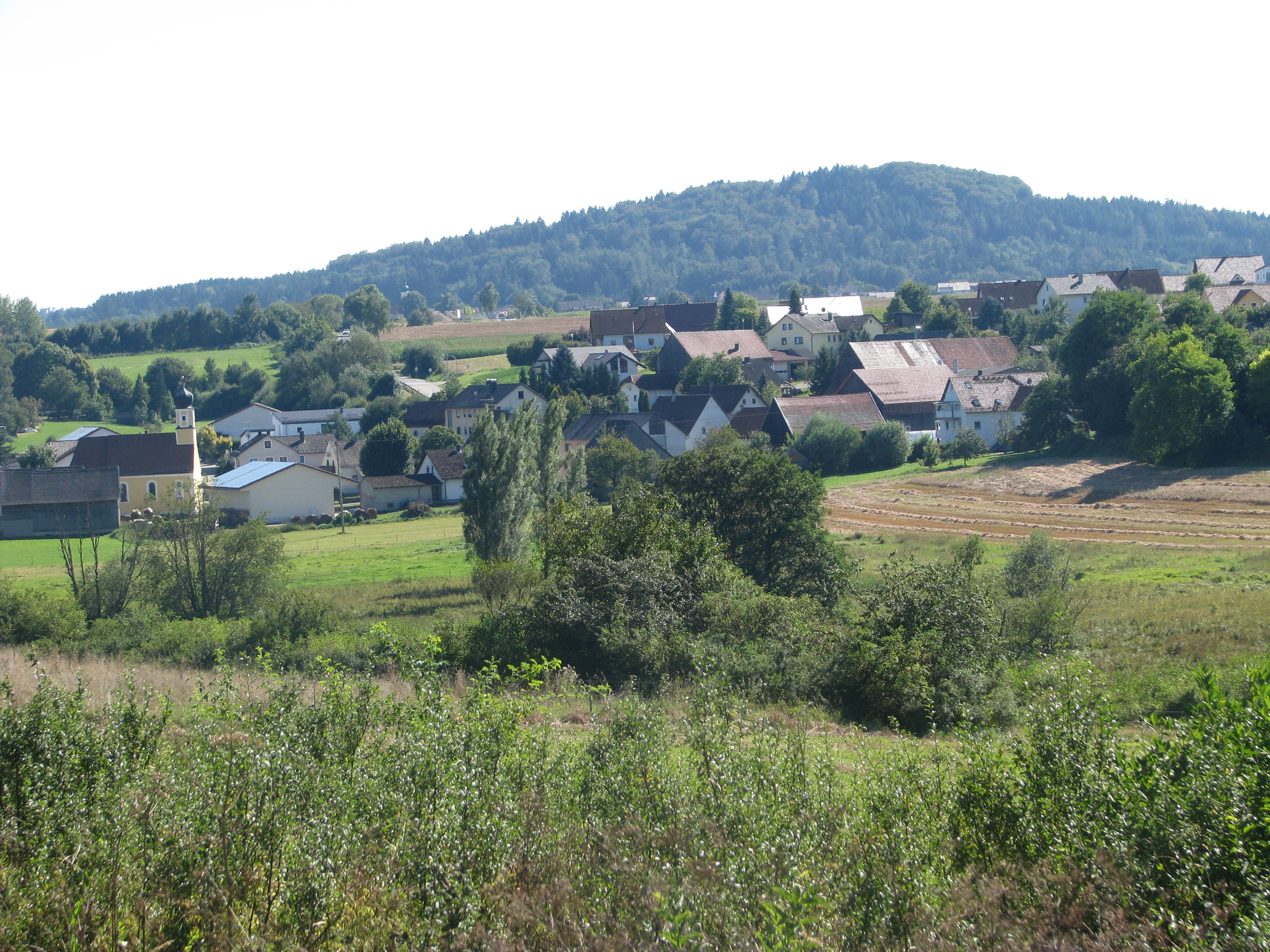 Hollerstetten, Ortsteil von Velburg im Landkreis Neumarkt i. d. Opf., Ortsansicht